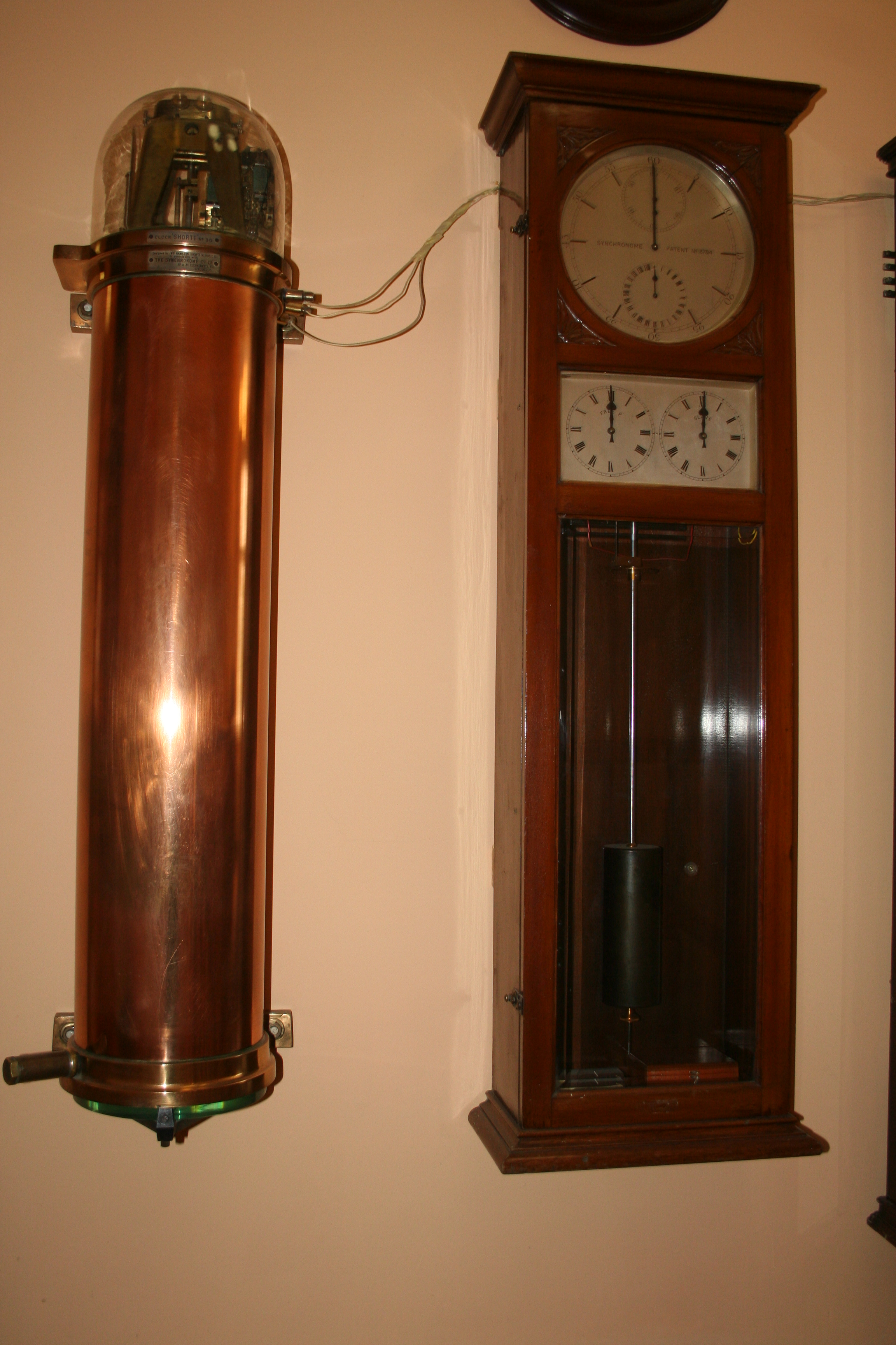 Zegar Shortta nr 30 z Obserwatorium Astronomicznego UAM